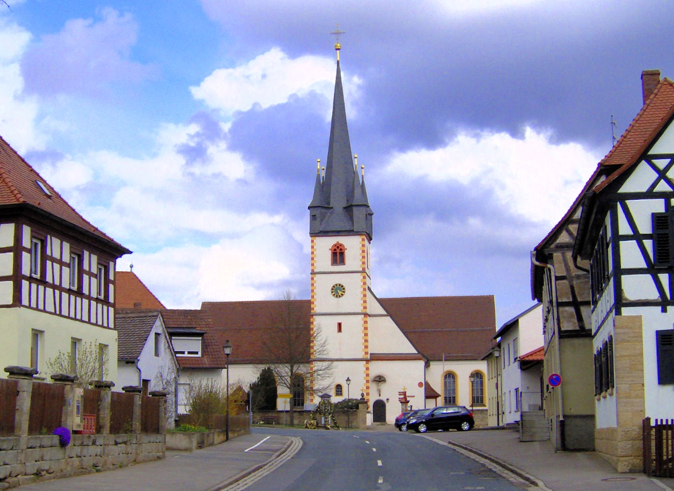 Kirche St. Aegidius - Church St. Aegidius - Amlingstadt - Germany